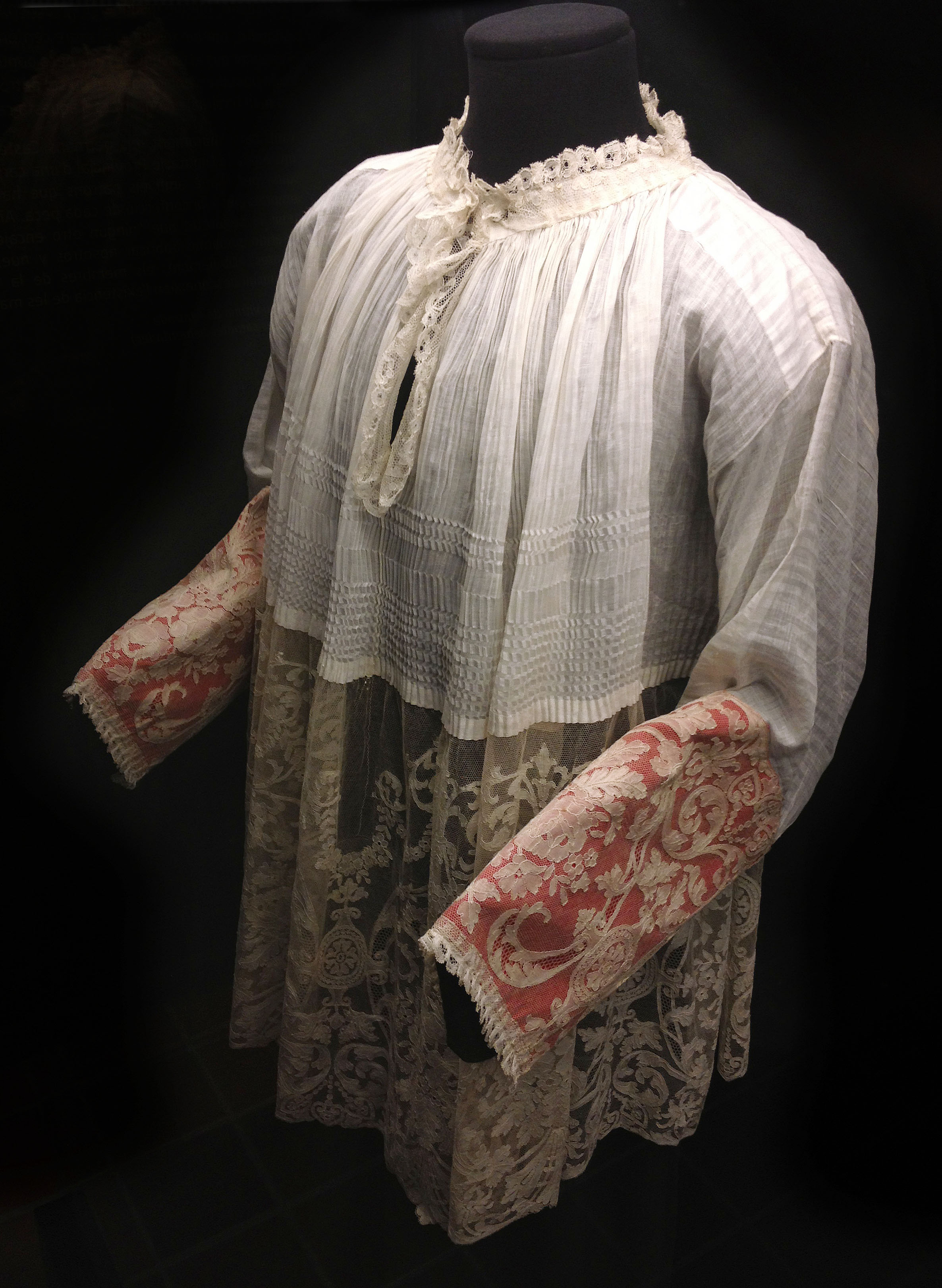 Roquet realitzat per la Casa Castells d'Arenys de Mar